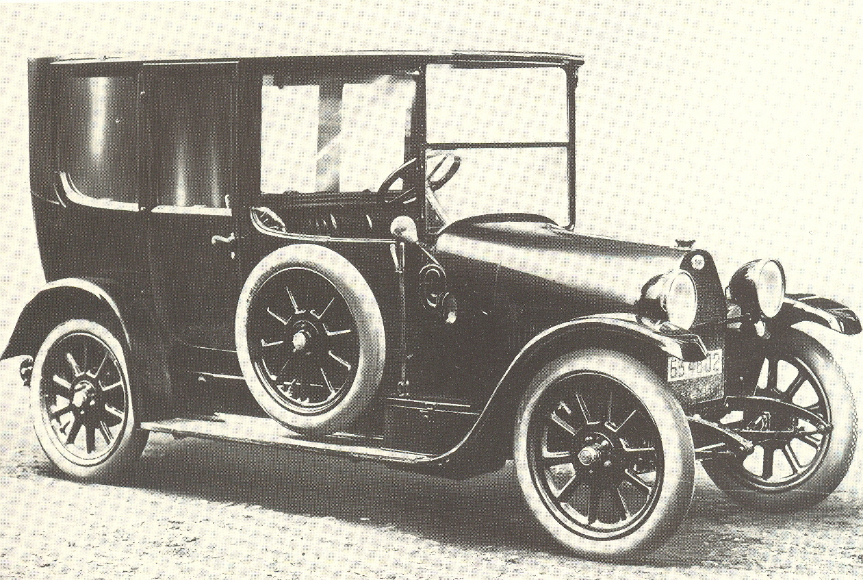 Fiat Tipo 70 Sedan (1915)